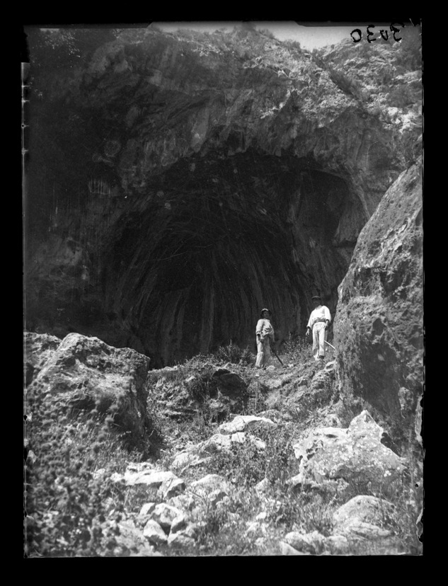 Vista de l'entrada de la Cova Negra (Xàtiva) amb dos obrers en un lateral de la imatge. 1928 [Arxiu Negatius - 3030]